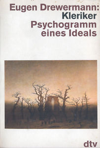 Eugen Drewermann, Umschlagbild des Buches "Kleriker".